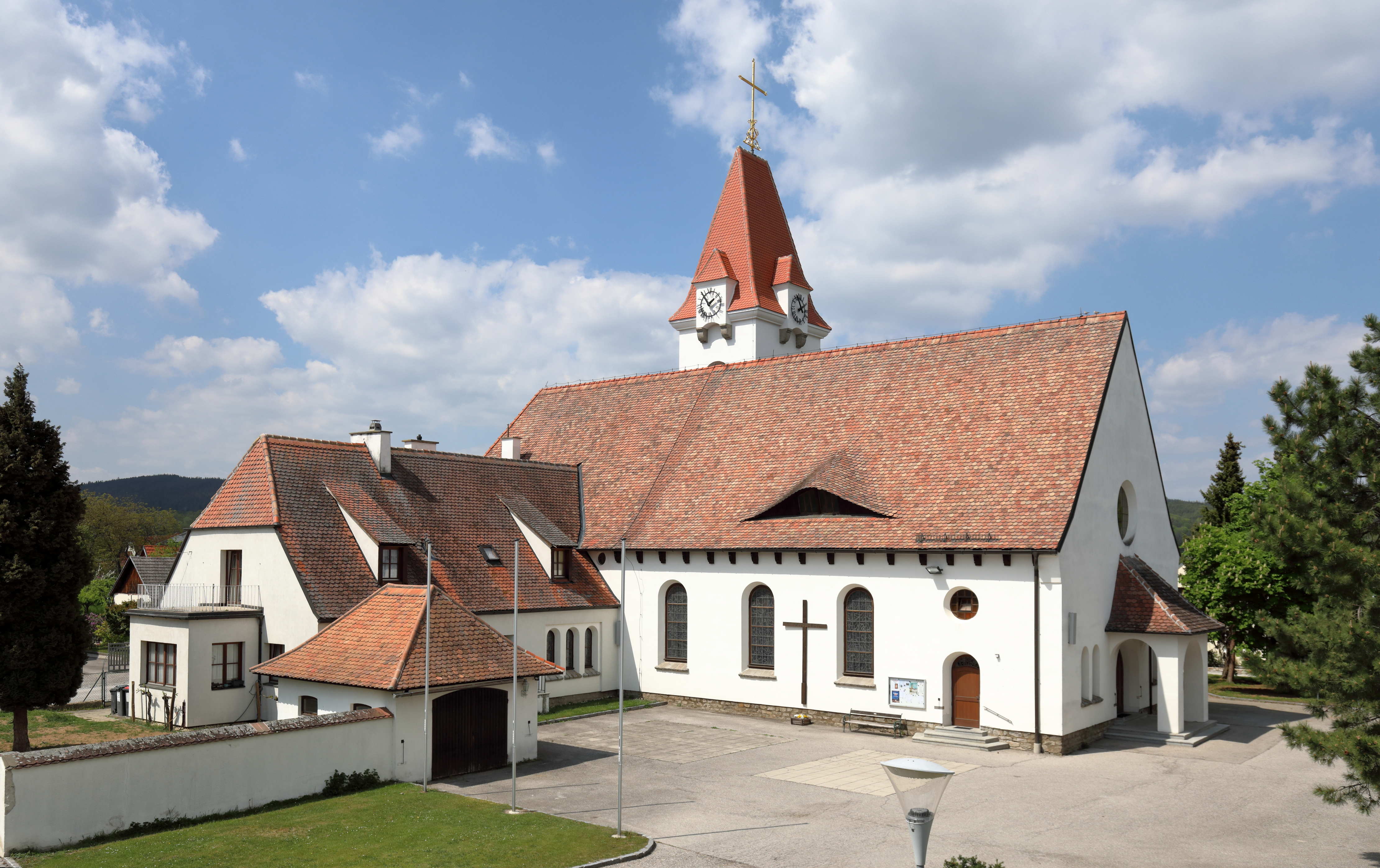 Südostansicht der röm.-kath. Pfarr- und Wallfahrtskirche Maria Fatima und des angebauten Pfarrhofes in der niederösterreichischen Gemeinde Droß.Die Kirche mit einem seitlich gestellten Turm und Satteldach wurde im Heimatstil errichtet. Sie wurde ab 1949 nach Plänen des Architekten Helmut Schopper aus Langenlois erbaut und am 3. Mai 1953 vom St. Pöltner Bischof-Koadjutor, dem späteren Wiener Kardinal Dr. Franz König, geweiht.